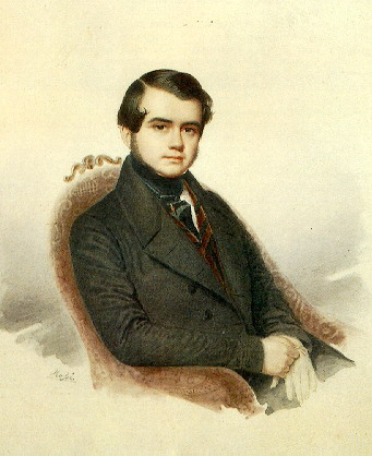 портрет Владимир Соллогуб (по небесспорной атрибуции И.Л.Андронникова)